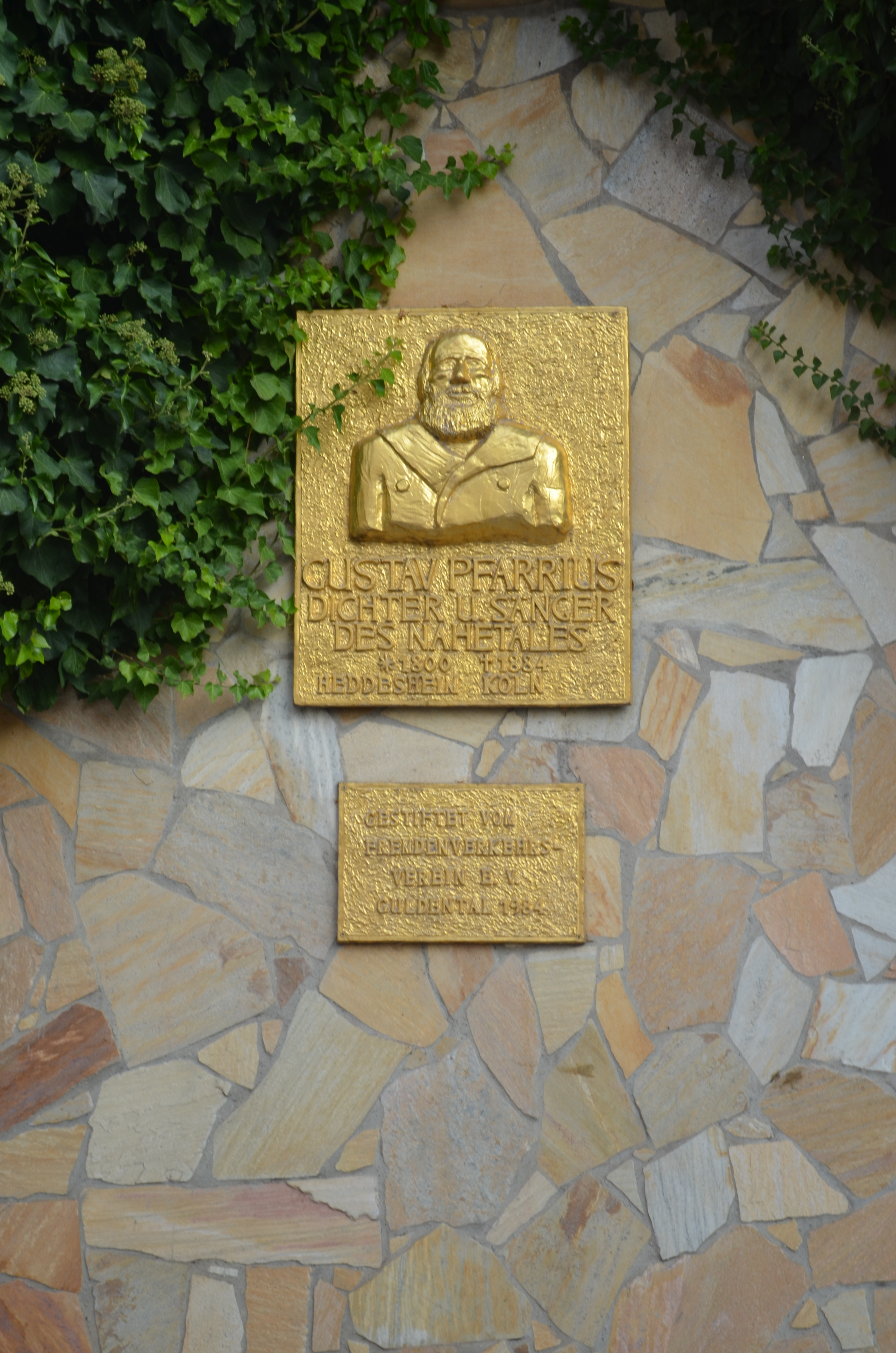 Guldental Heddesheim, Plakette Gustav Pfarrius